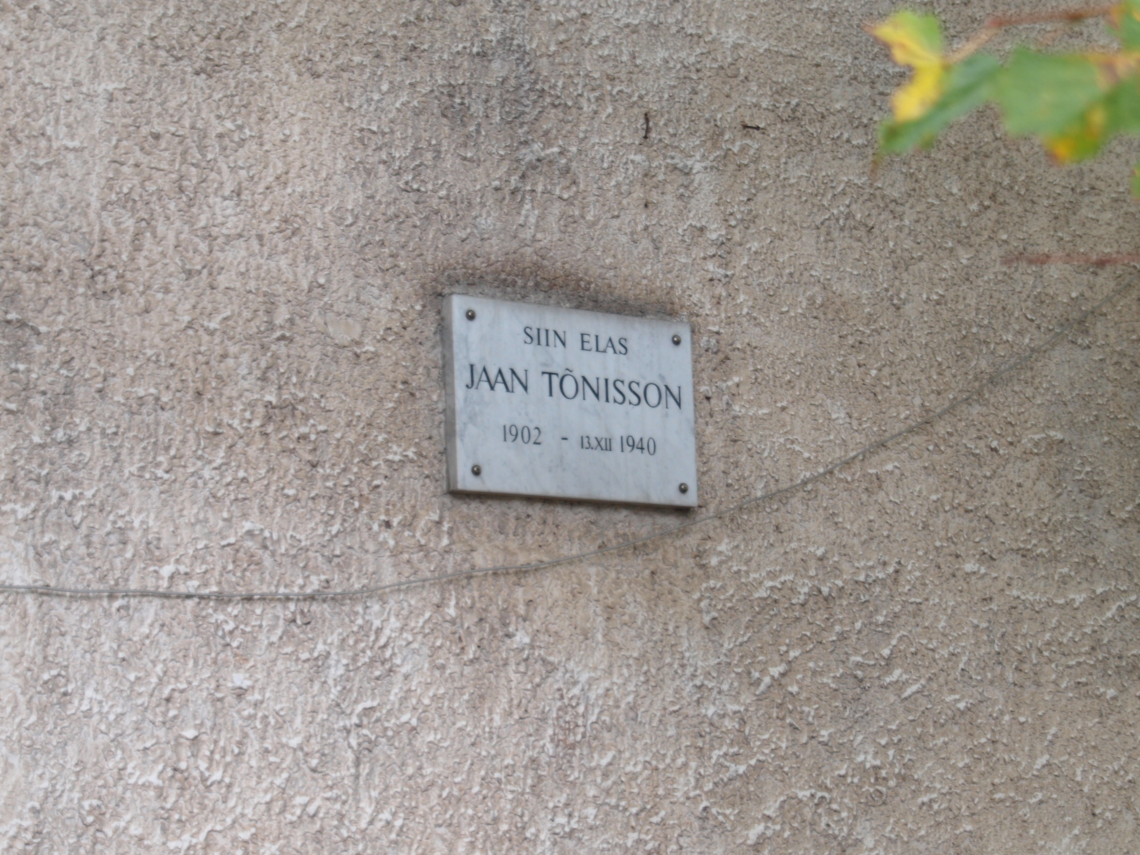 Maja. kus eslas J. Tõnisson